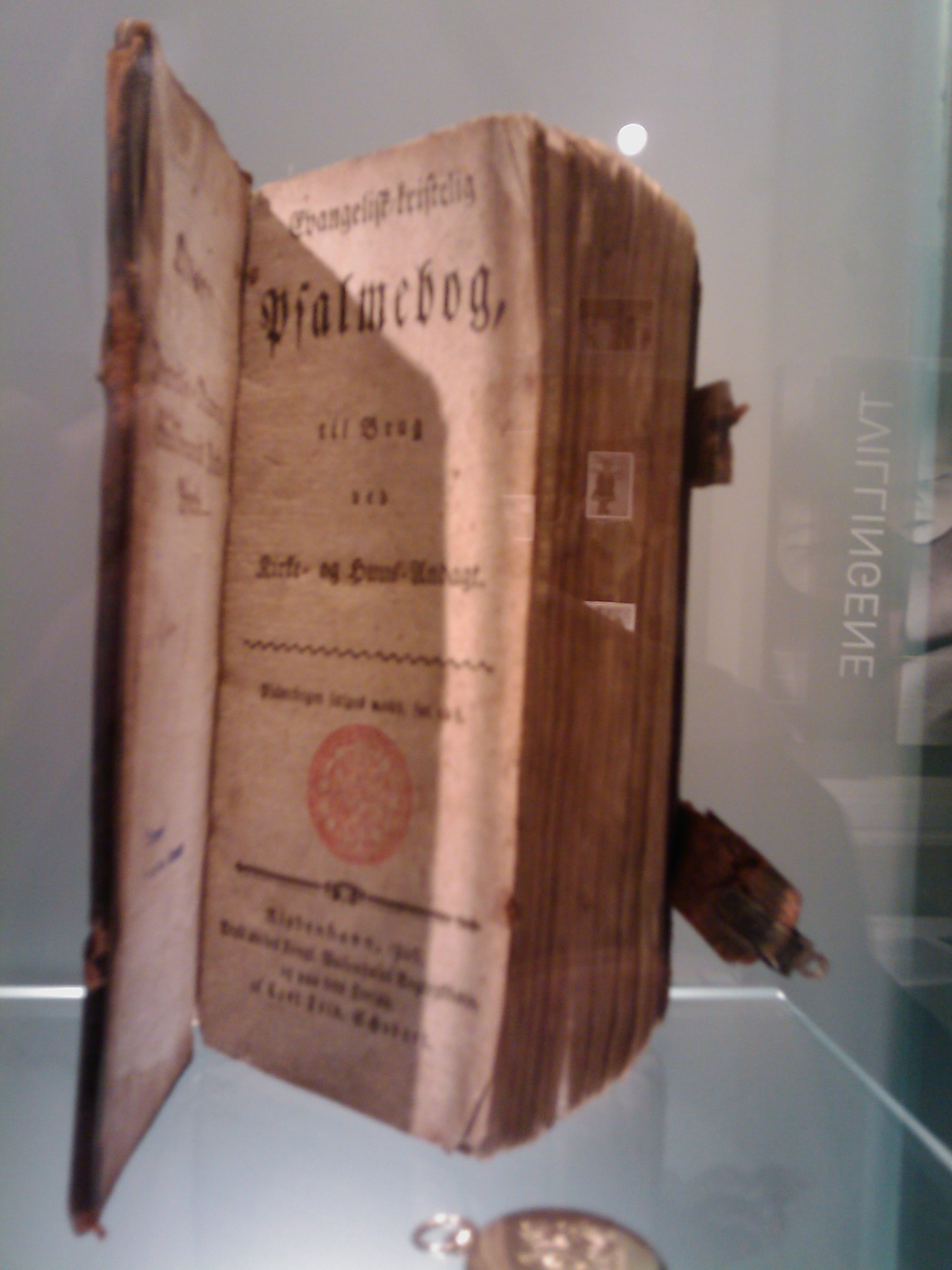 Evangelisk-kristelig Psalmebog til Brug ved Kirke- og Huus-Andagt. Norsk salmebok fra 1798. Dette eksemplaret er trykket i København i 1806 og står utstilt på Hringariki, Veien Kulturminnepark på Hønefoss.